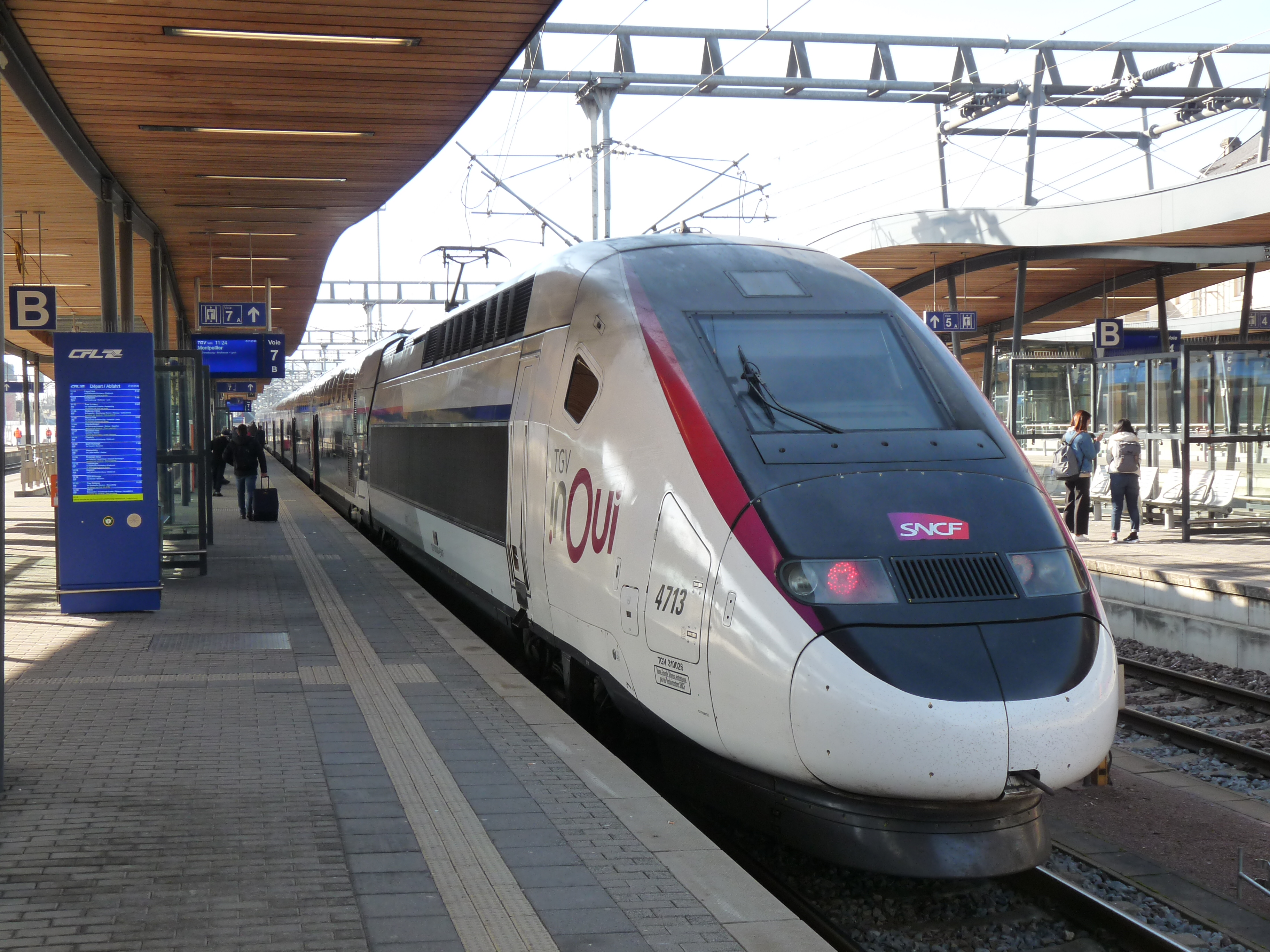 De TGV naar Montpellier in Luxemburg station